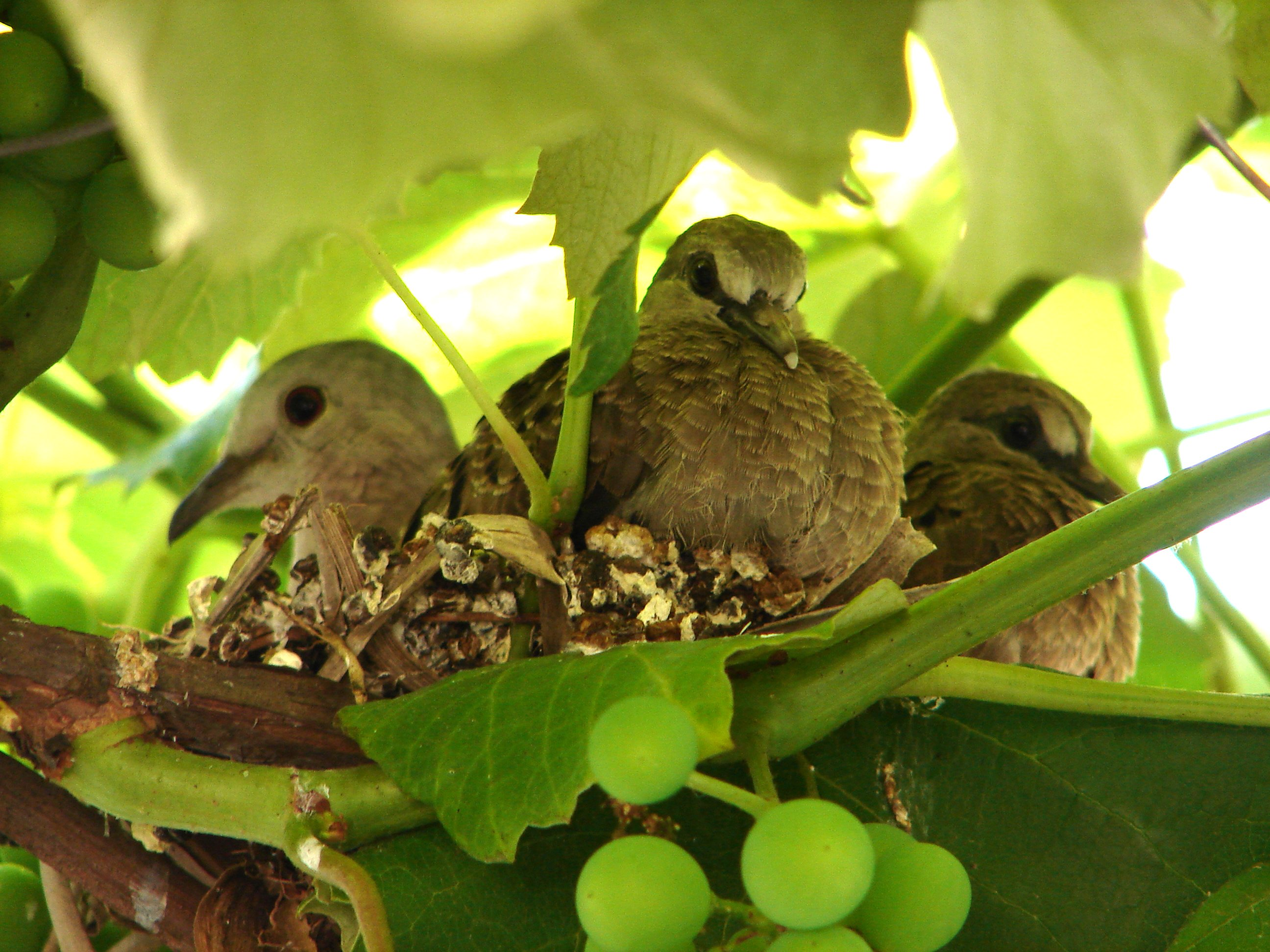 Pomba rola no ninho e 2 filhotes - porto alegre - rs